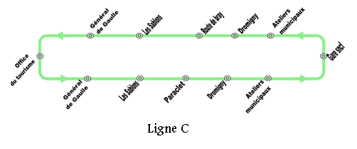 PROBUS